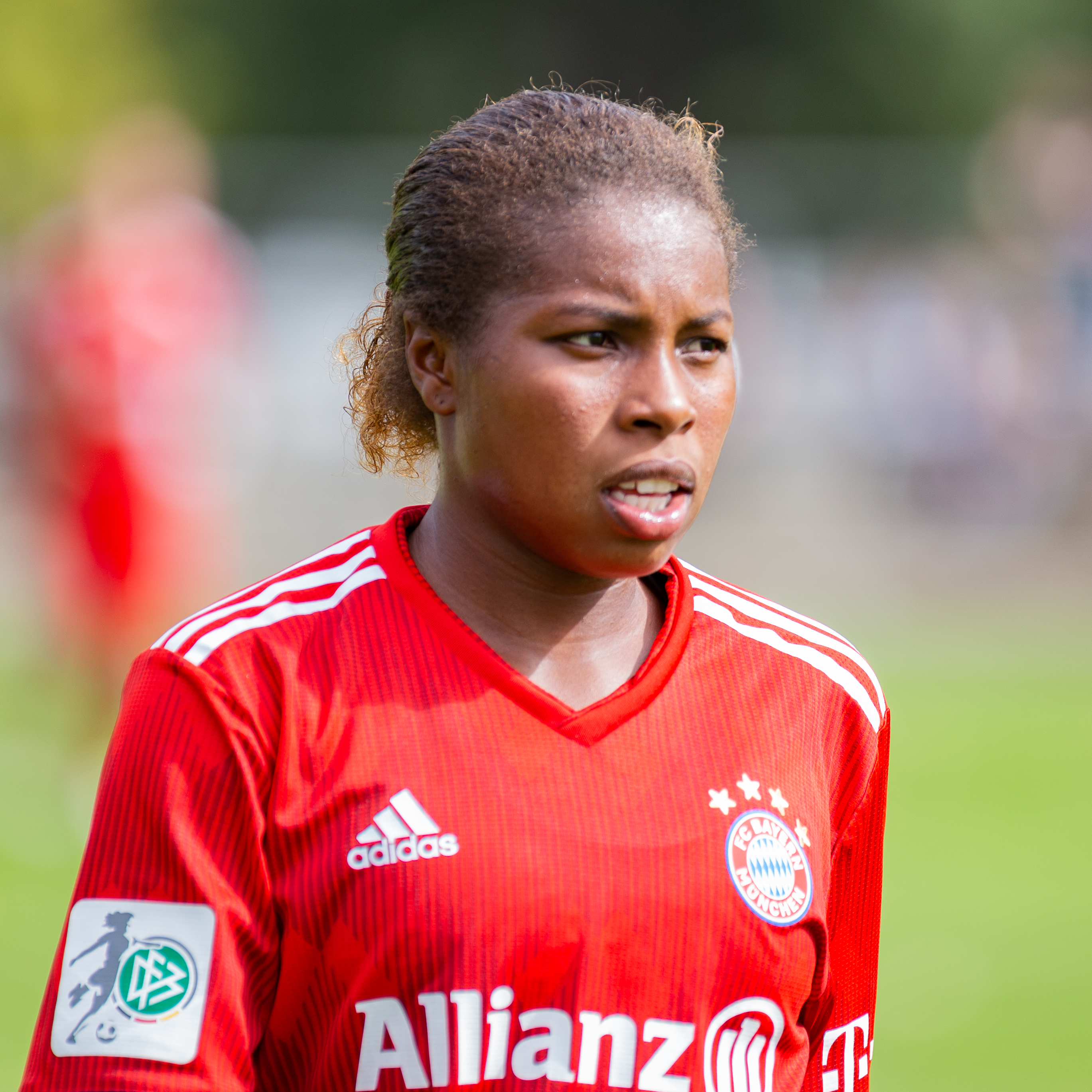 Fußball, DFB-Pokal Frauen, FF USV Jena - FC Bayern München; Lineth Beerensteyn (FC Bayern München, 16)